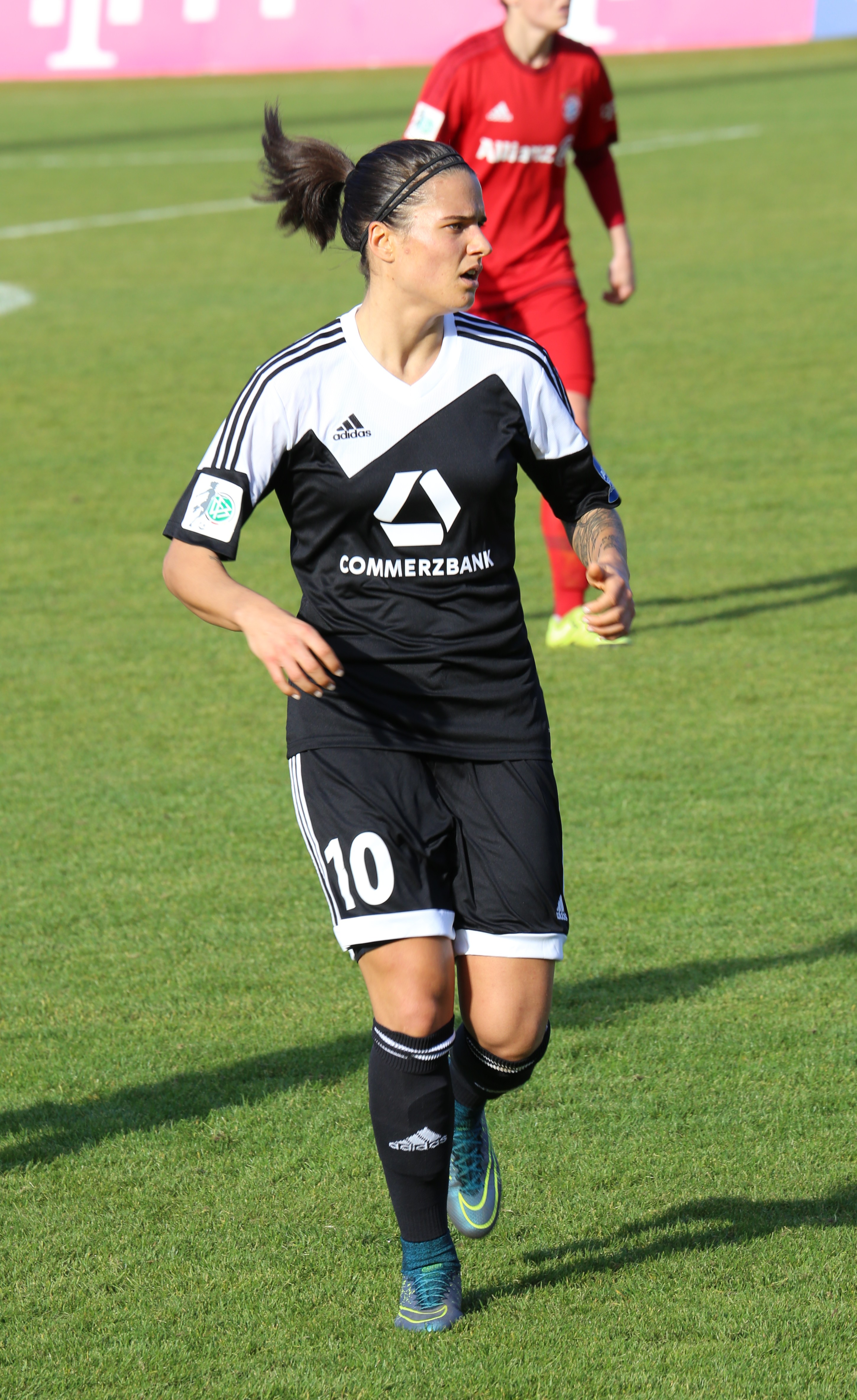 Dzsenifer Marozsan (1. FFC Frankfurt), im DFB-Pokal-Achtelfinale zwischen FC Bayern München und 1. FFC Frankfurt, Ergebnis 2:0, Stadion an der Grünwalder Straße